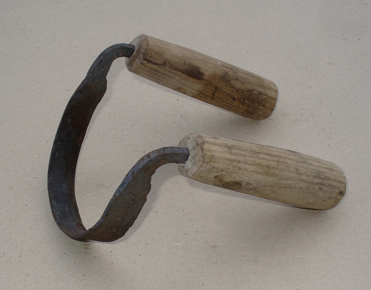 Горбатый скобель с изогнутым лезвием